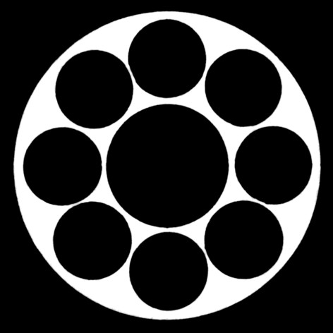 石持に九曜